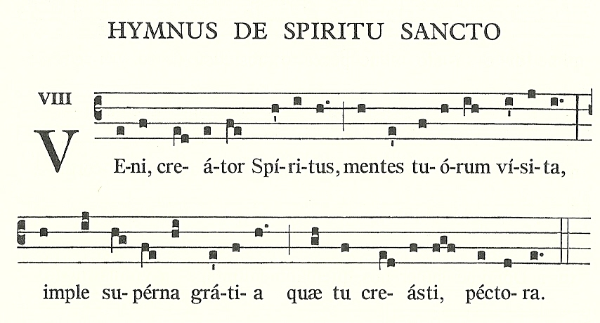 Hymnus "Veni creator spiritus", Graduale Romanum